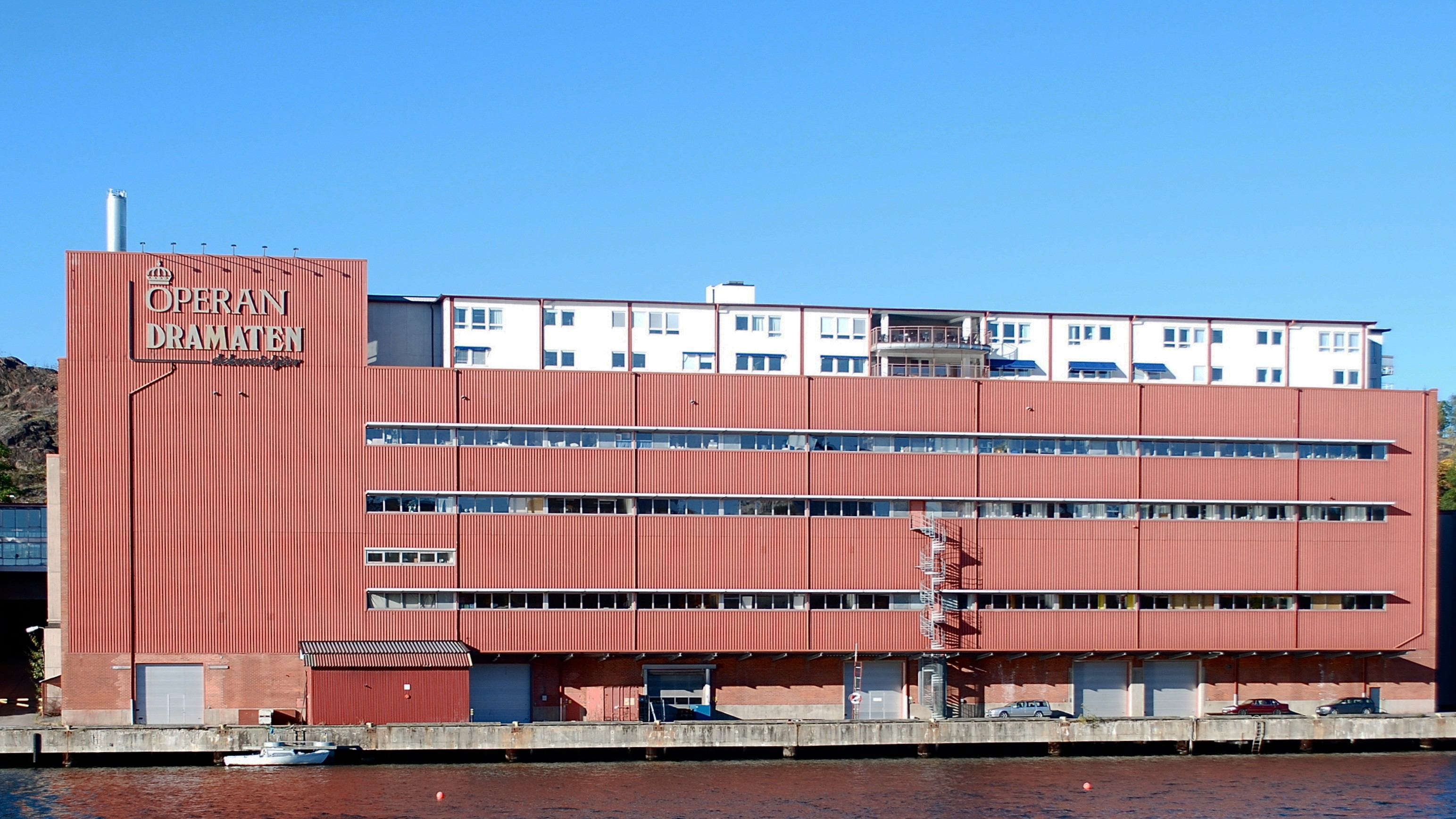 Kungliga Operan och Dramatens ateljéer vid Gäddviken. Huset inrymmer också Sveriges teatermuseum. Ursprungligen Cirkelkaffe kafferosteri, ägt av konsumentkooperationen.